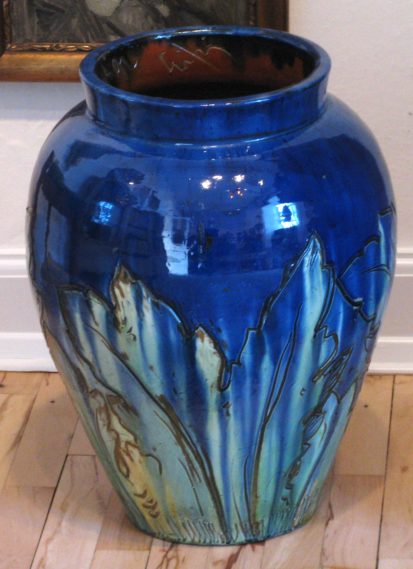 Krukke af Thorvald Bindesbøll på Koldinghus